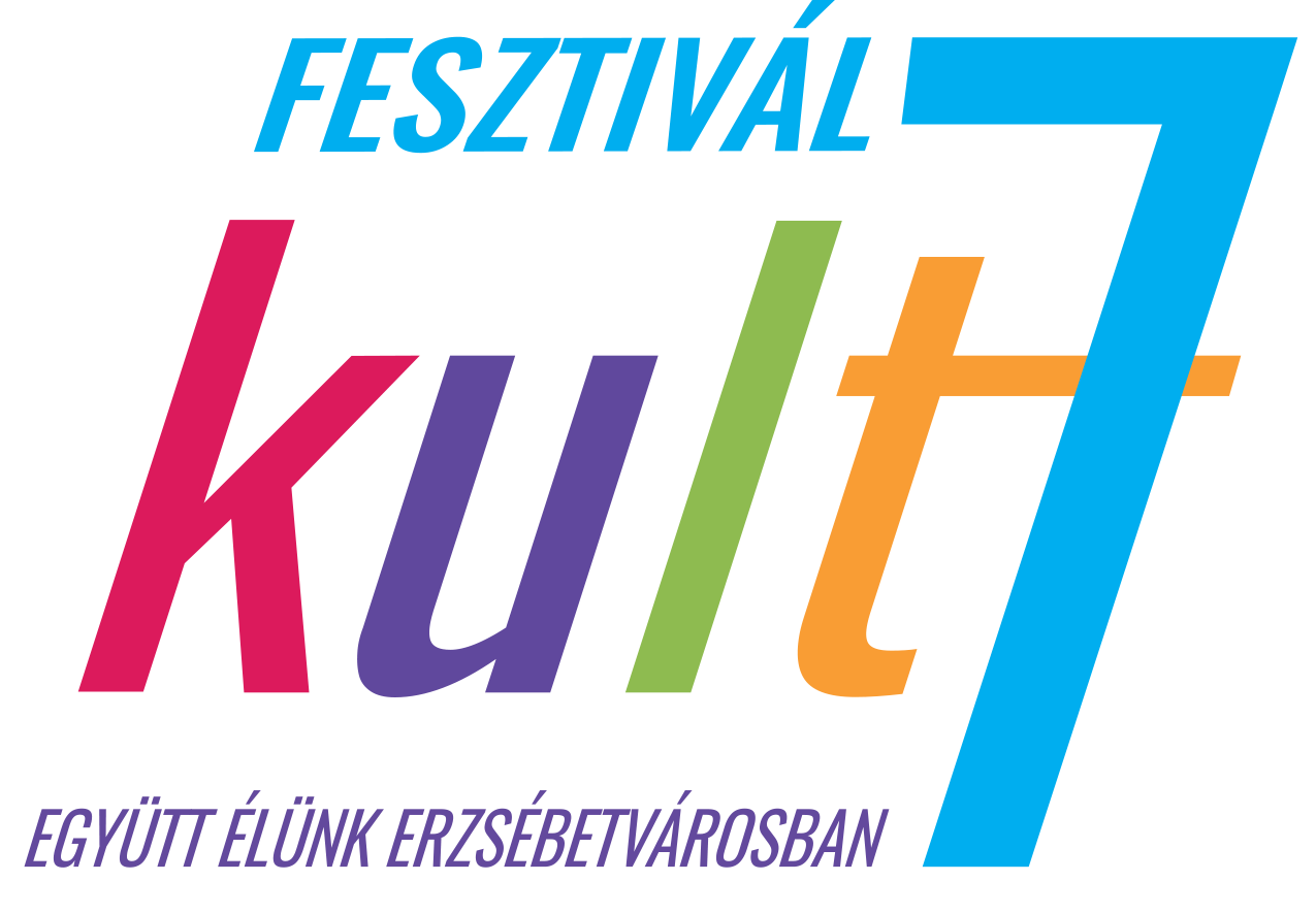 Kult7 fesztivál